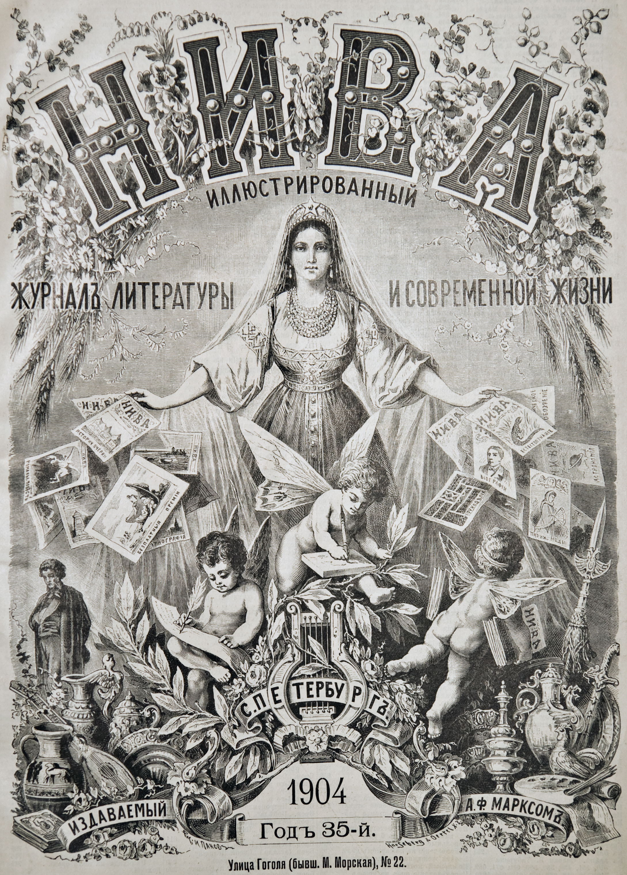 Обложка журнала Нива за 1904 год